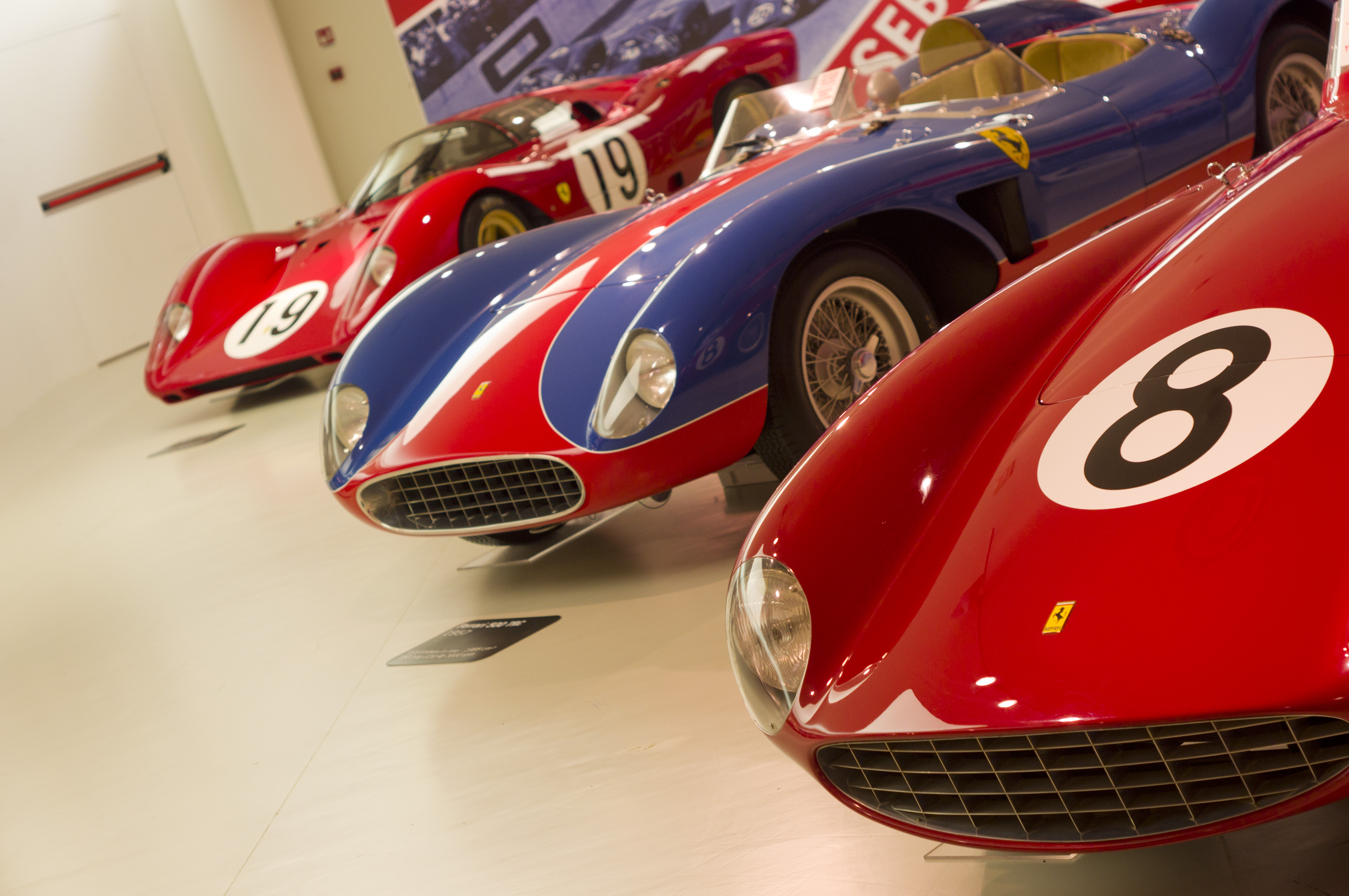 From left to right; Ferrari 750 Monza (1954), Ferrari 500 TRC (1957), Ferrari 312 P (1971)